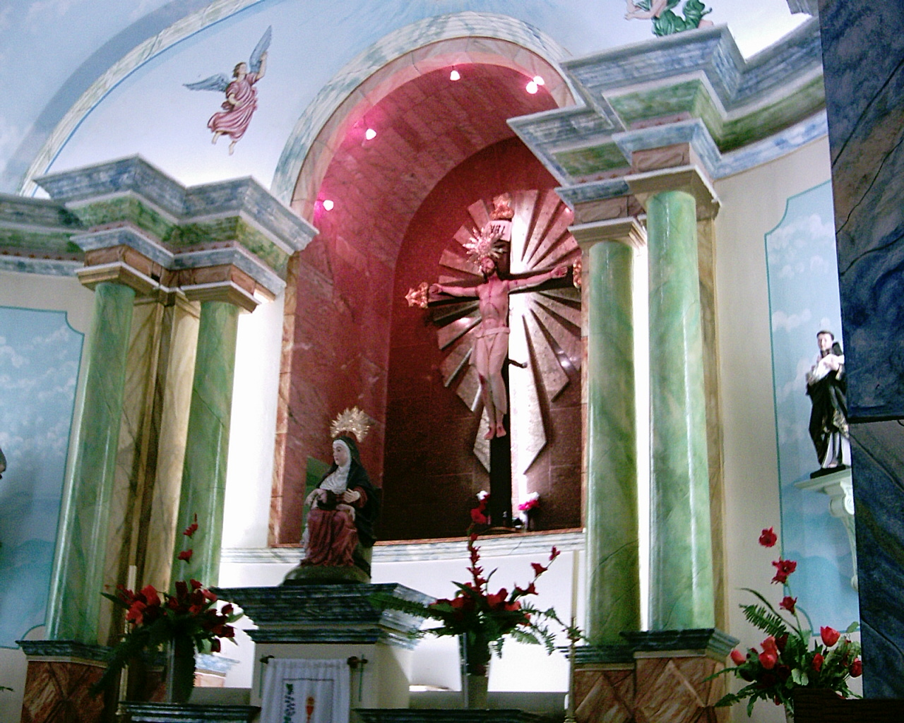 Imagem de Jesus crucificado atribuida a Aleijadinho no Santuário Bom Jesus de Matosinhos em Paraíba do Sul